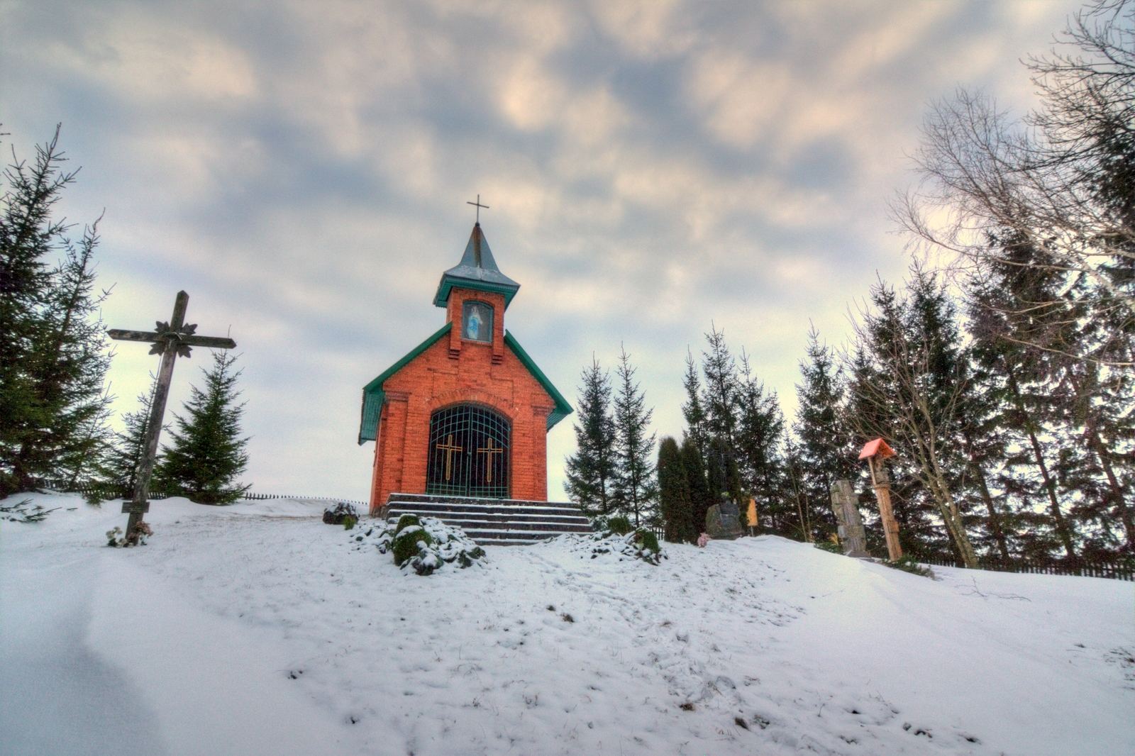 Koplyčia